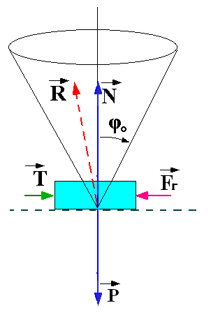 Diagrama de fuerza de fricción de un bloque sólido